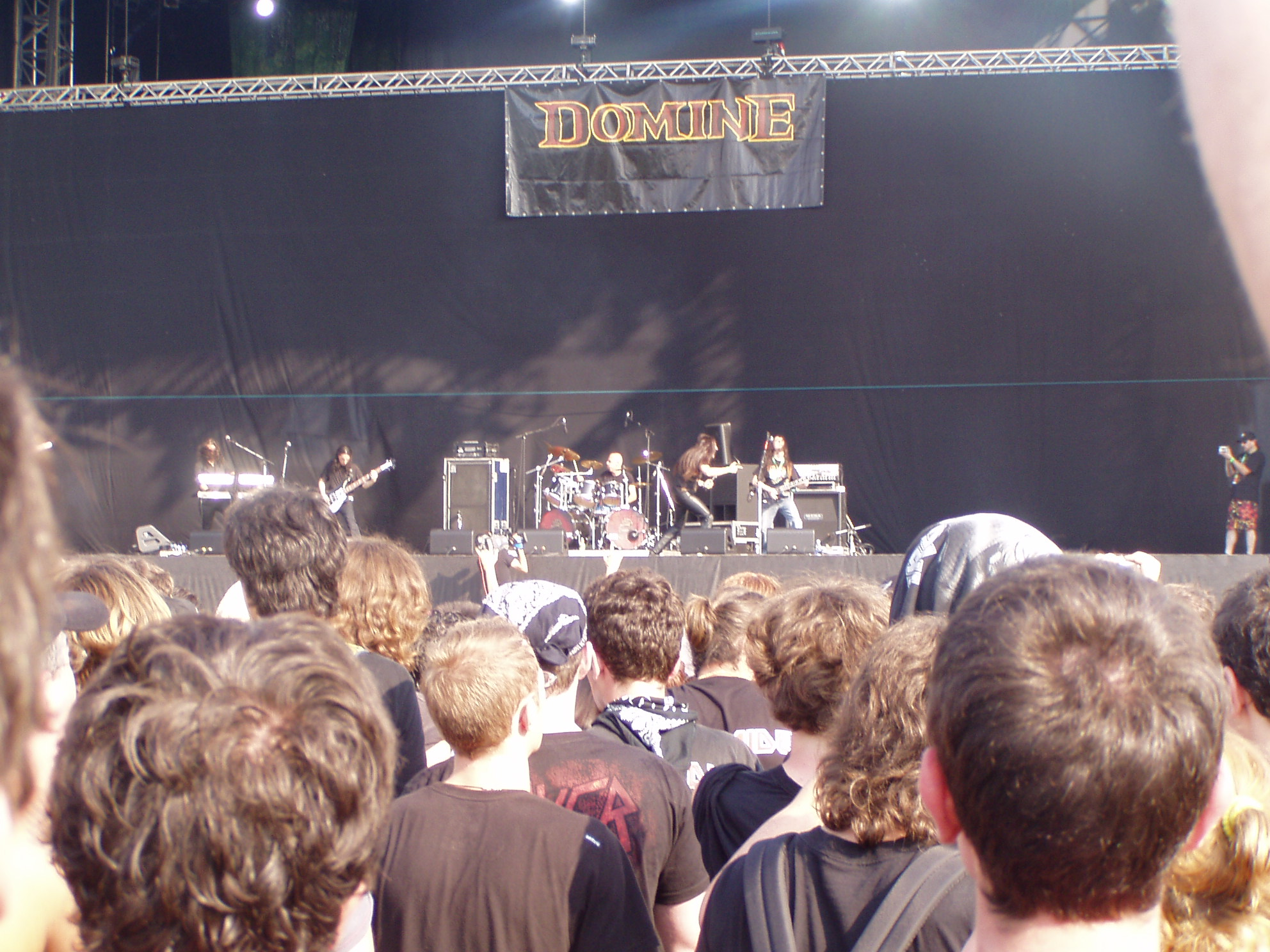 I Domine all'Heineken Jammin' Festival 2007